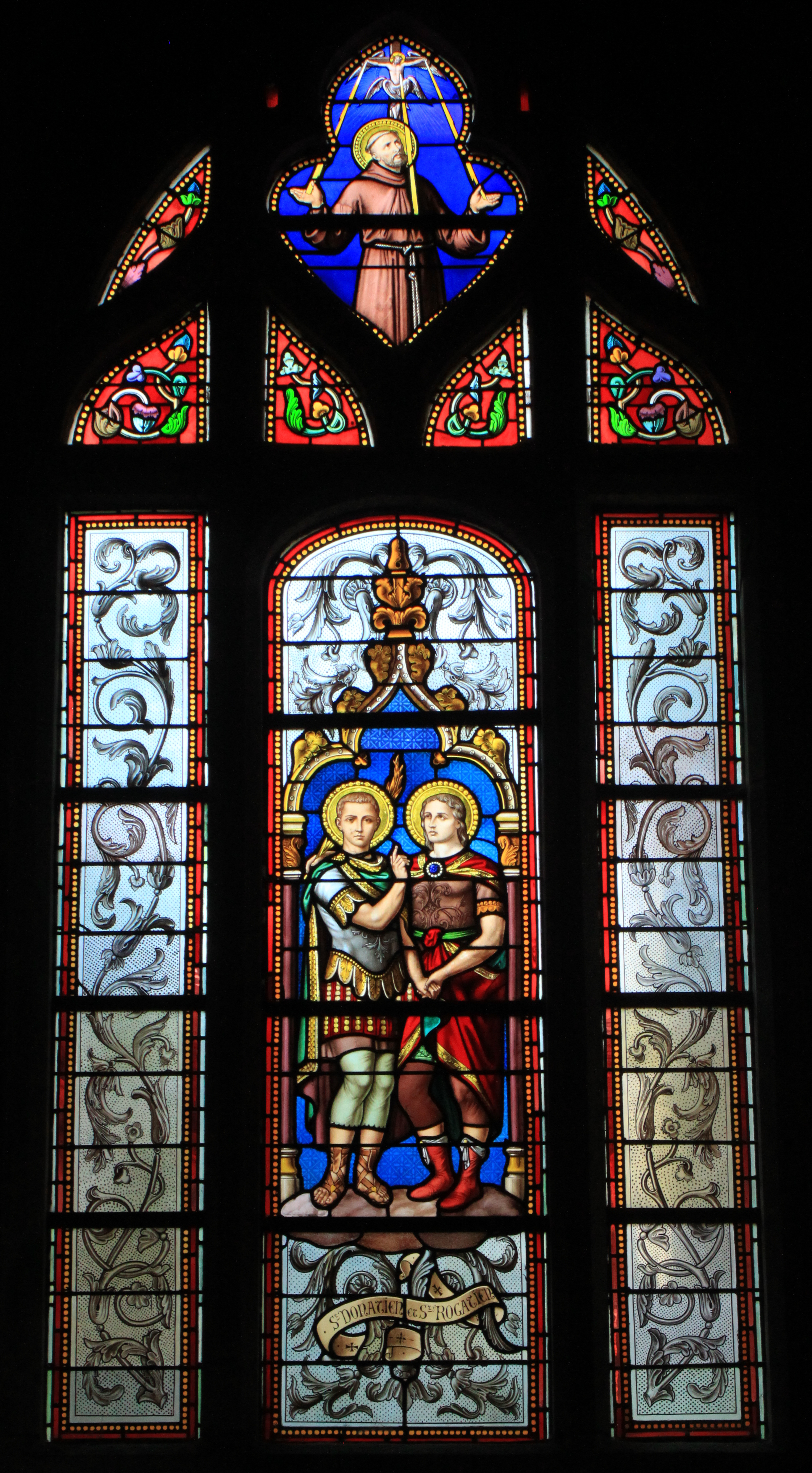 Vitrail de saints Donatien et Rogatien, église Saint-Guénolé, Fr-44-Batz-sur-Mer.